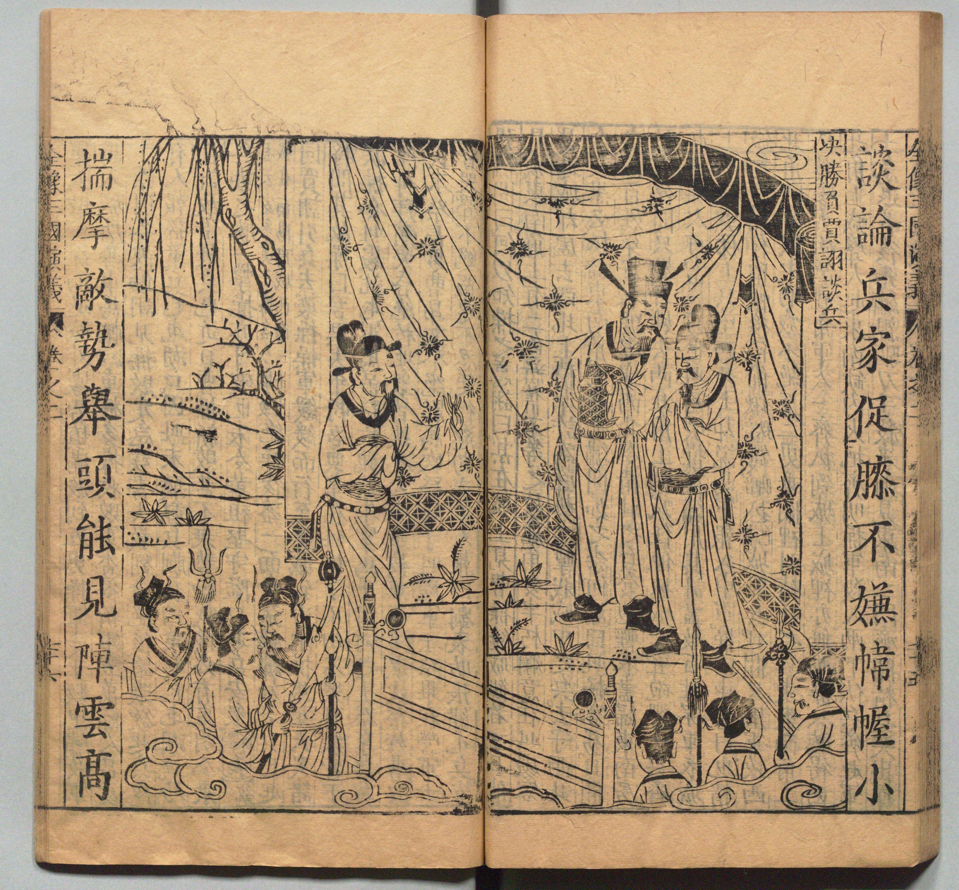 《新刊校正古本大字音释三国志通俗演义》 明万历十九年书林周曰校刊本